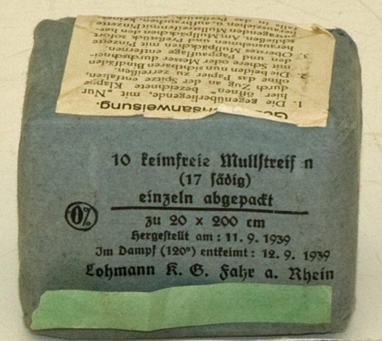 Ein Päckchen Verbandmull in einem grau-blauem Papierumschlag mit Aufdruck "10 keimfreie Mullstreifen / (17 fädig) / einzeln abgepackt / zu 20 x 200 cm / hergestellt am 11.9.1939 / In Dampf (120°) entkeimt: 12.9.1939 / Lohmann K.G. Fahr am Rhein"; darunter ist ein grüner Papierstreifen aufgeklebt; auf der Oberseite befindet sich eine Gebrauchsanweisung.